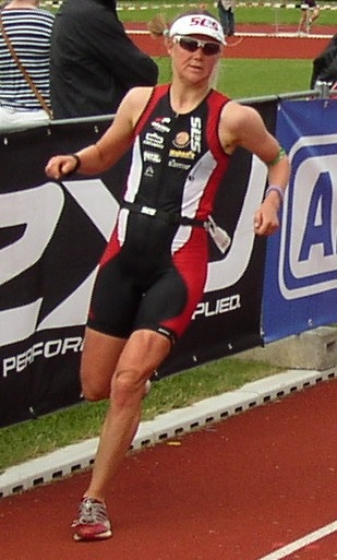 Dana Wagner beim Peine Triathlon 2013